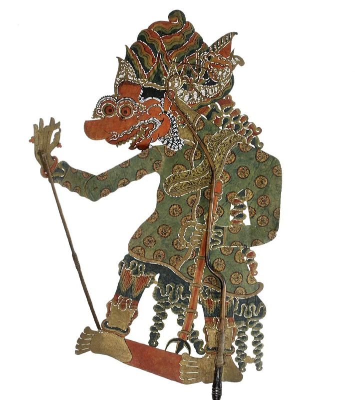 Schaduwfiguur. Wajangpop, voorstellende Batara Jamadipati Unknown language: Wayang kulit purwa